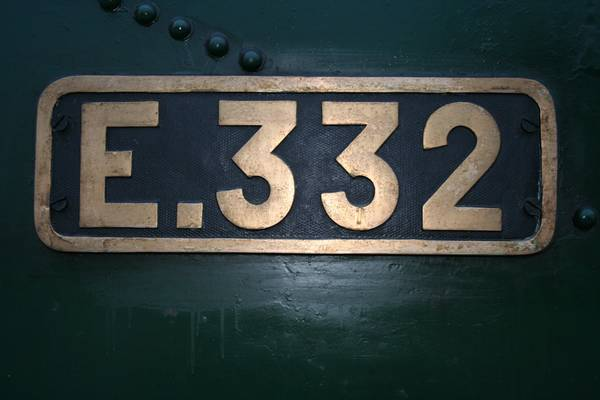 Plaque numéro d'exploitation de la 230T E332 du Réseau Breton